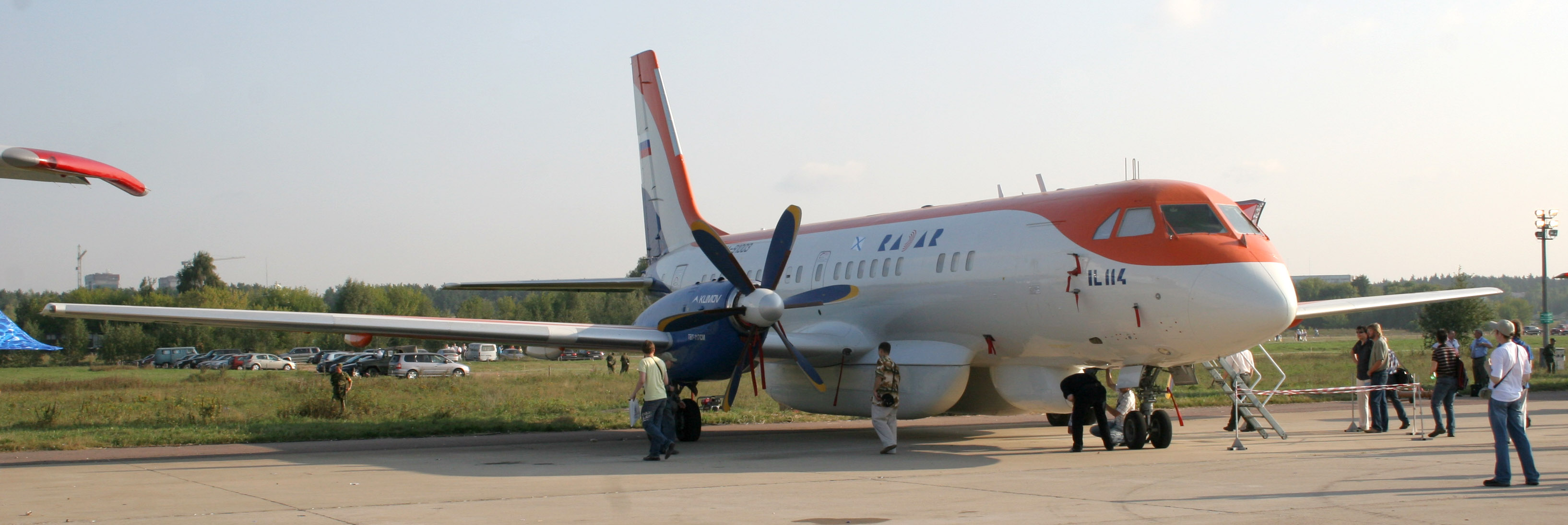 Самолёт Ил 114. Экспозиция МАКС-2007